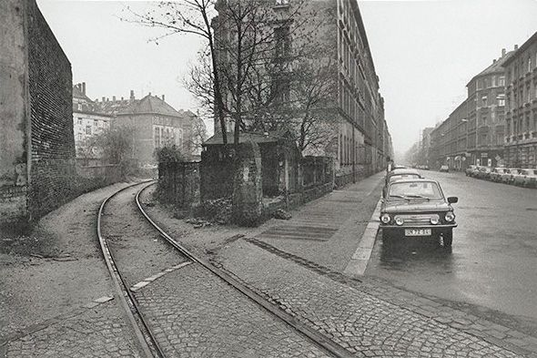 Leipzig Plagwitz- Lindenau, 1989. Industriestammgleis PI vom Bahnhof Plagwitz kommend, die Endersstrasse kreuzend, in Richtung Ladestelle III.